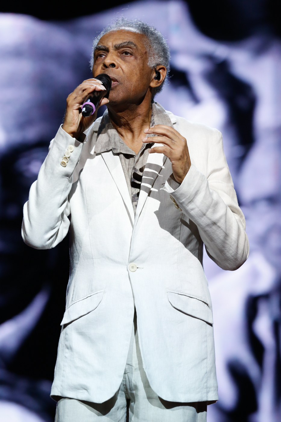 Gilberto Gil durante o 25o Premio da Musica Brasileira no Theatro Municipal. Foto: Roberto Filho (14/05/14)